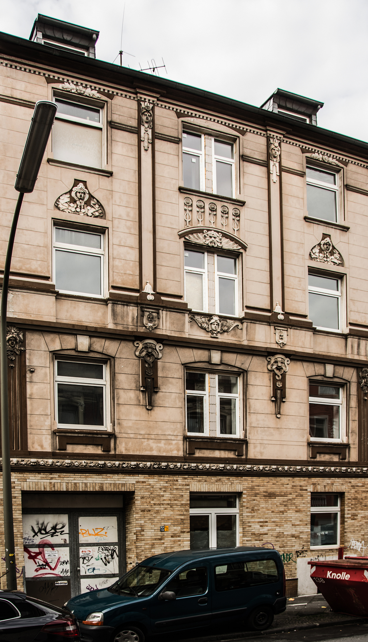 Wohnhaus eines Opfers des Naziterrors